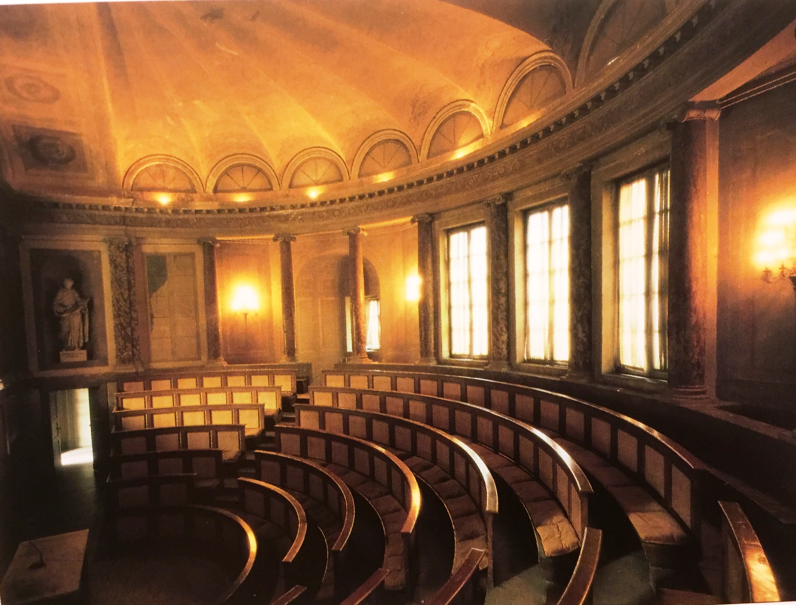 aula Volta